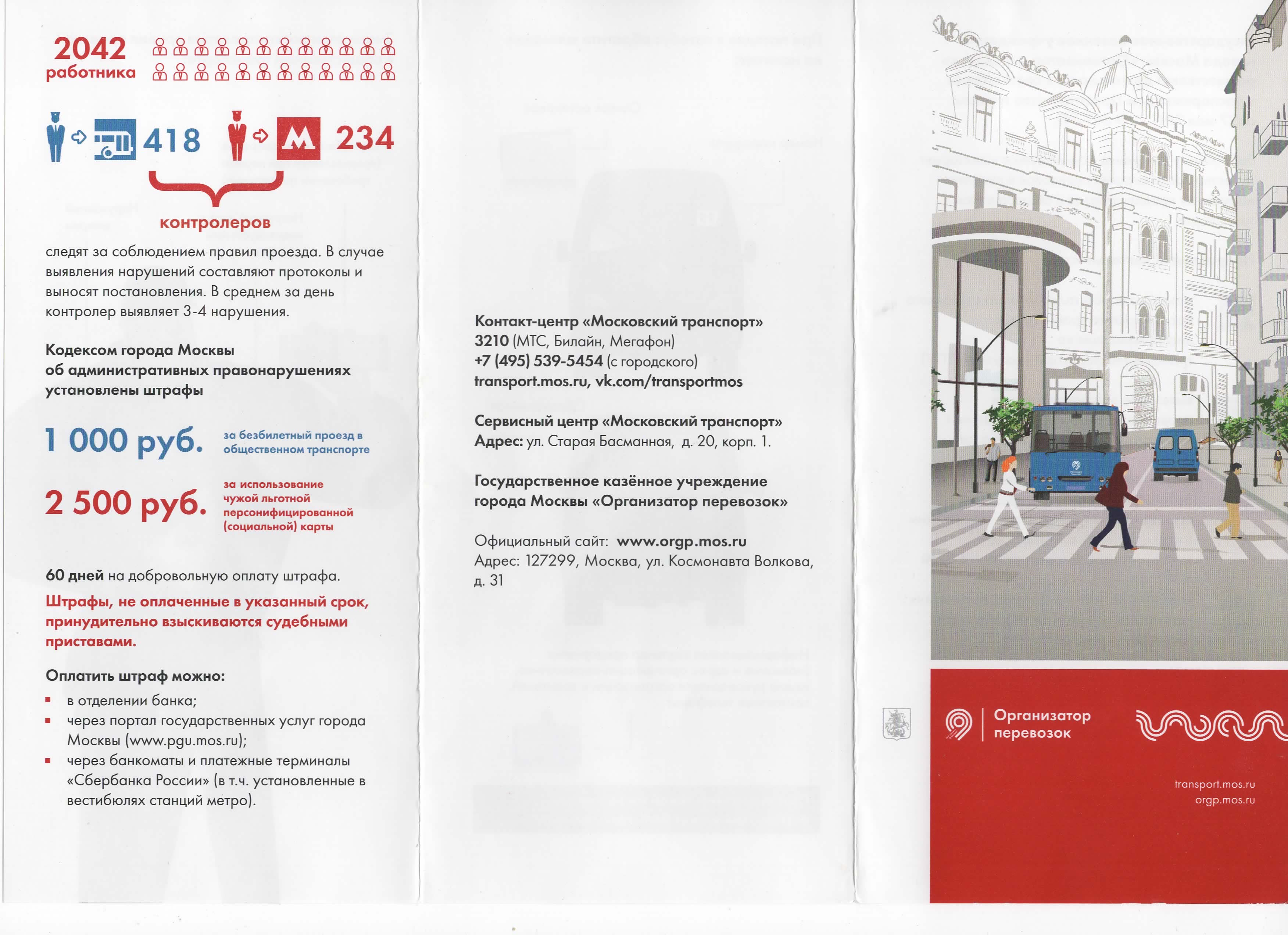 Отсканированная листовка о государственном казённом учреждении города Москвы «Организатор перевозок». Свободно распространялась в сервисном центре «Московский транспорт».